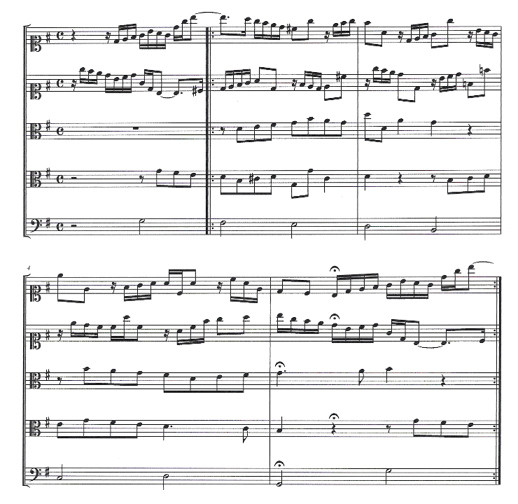 BWV 1087 Kanon 12, mögliche Ausführung